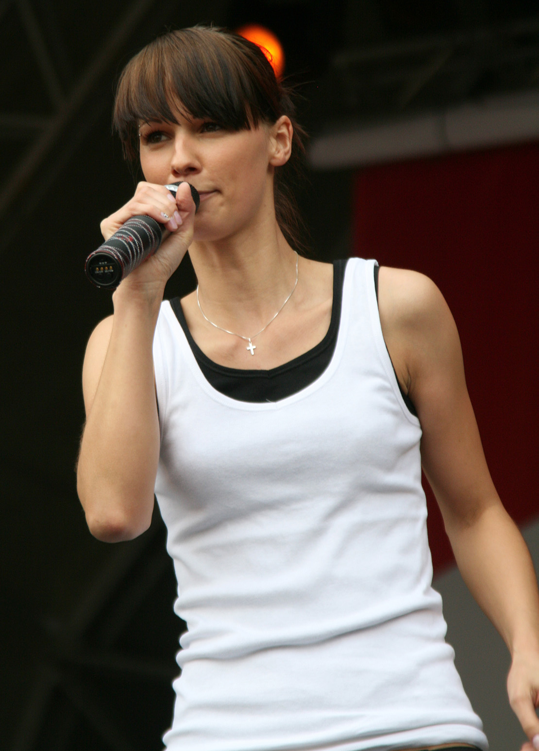 Die österreichische Sängerin Christina Stürmer während des Konzerts zur Eröffnung der Fußball-Europameisterschaft 2008 in Wien.